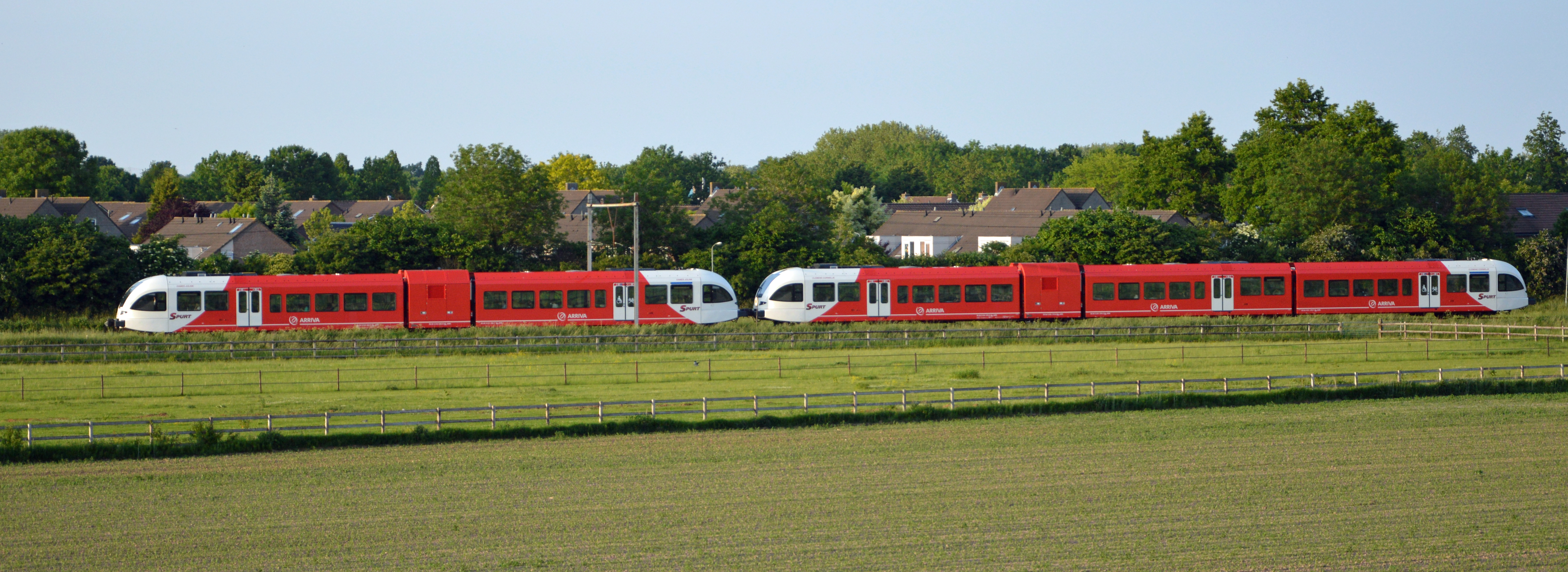 Twee Arriva stellen zojuist vanuit de Achterhoek, de hoofdlijn tussen Arnhem en de Duitse grens opgereden. In de buitenwijken van Zevenaar richting Arnhem. In the suburbs of the Dutch town Zevenaar this Arriva couple is on it's way to Arnhem.